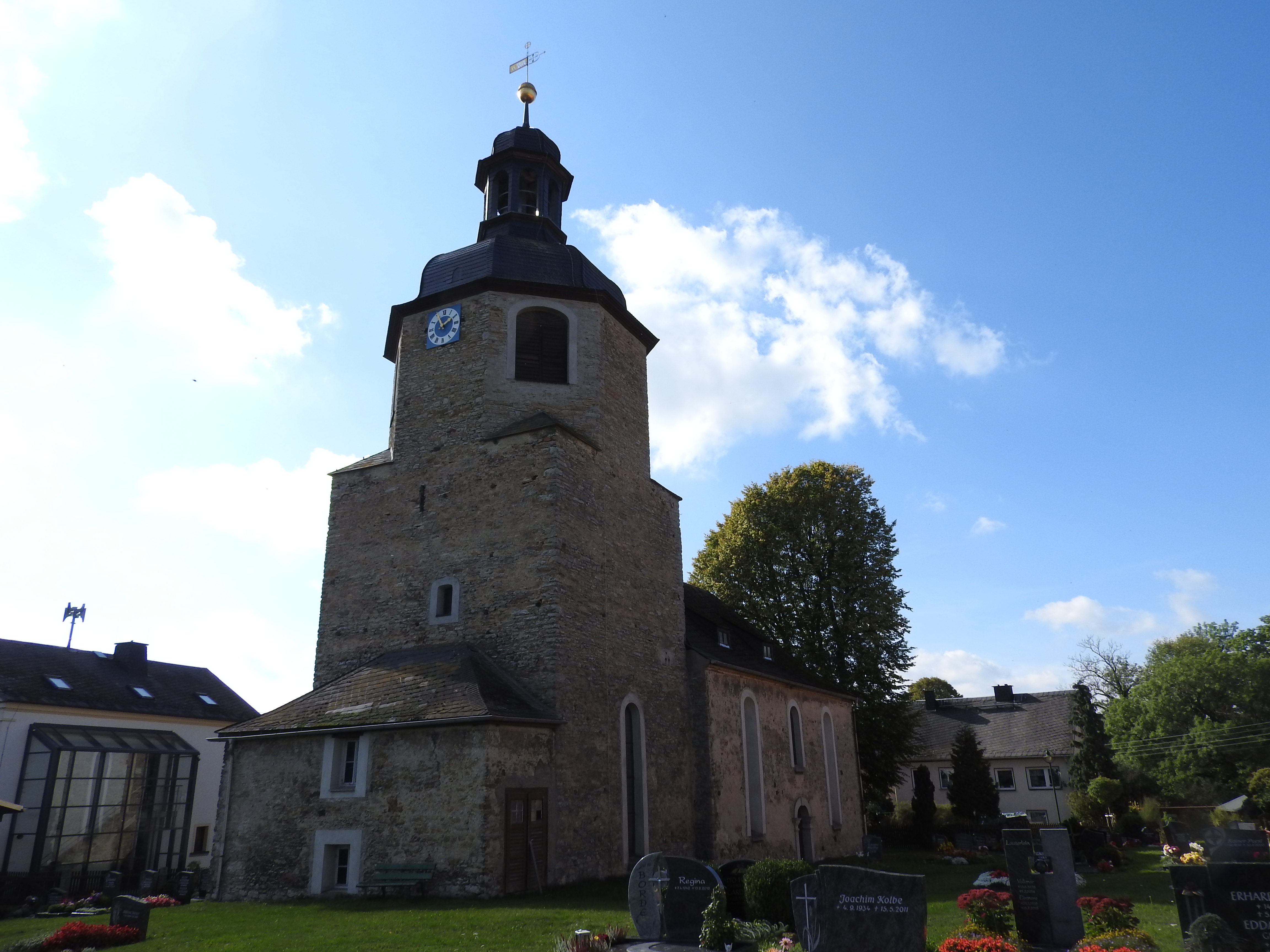 Kirche von Löhma, Thüringen